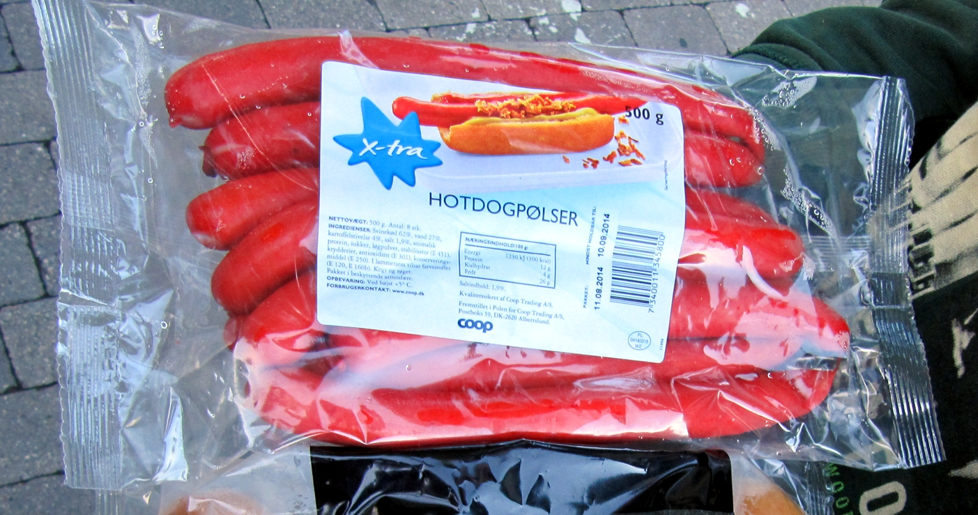 Rød pølse by GeoTrinity in Denmark